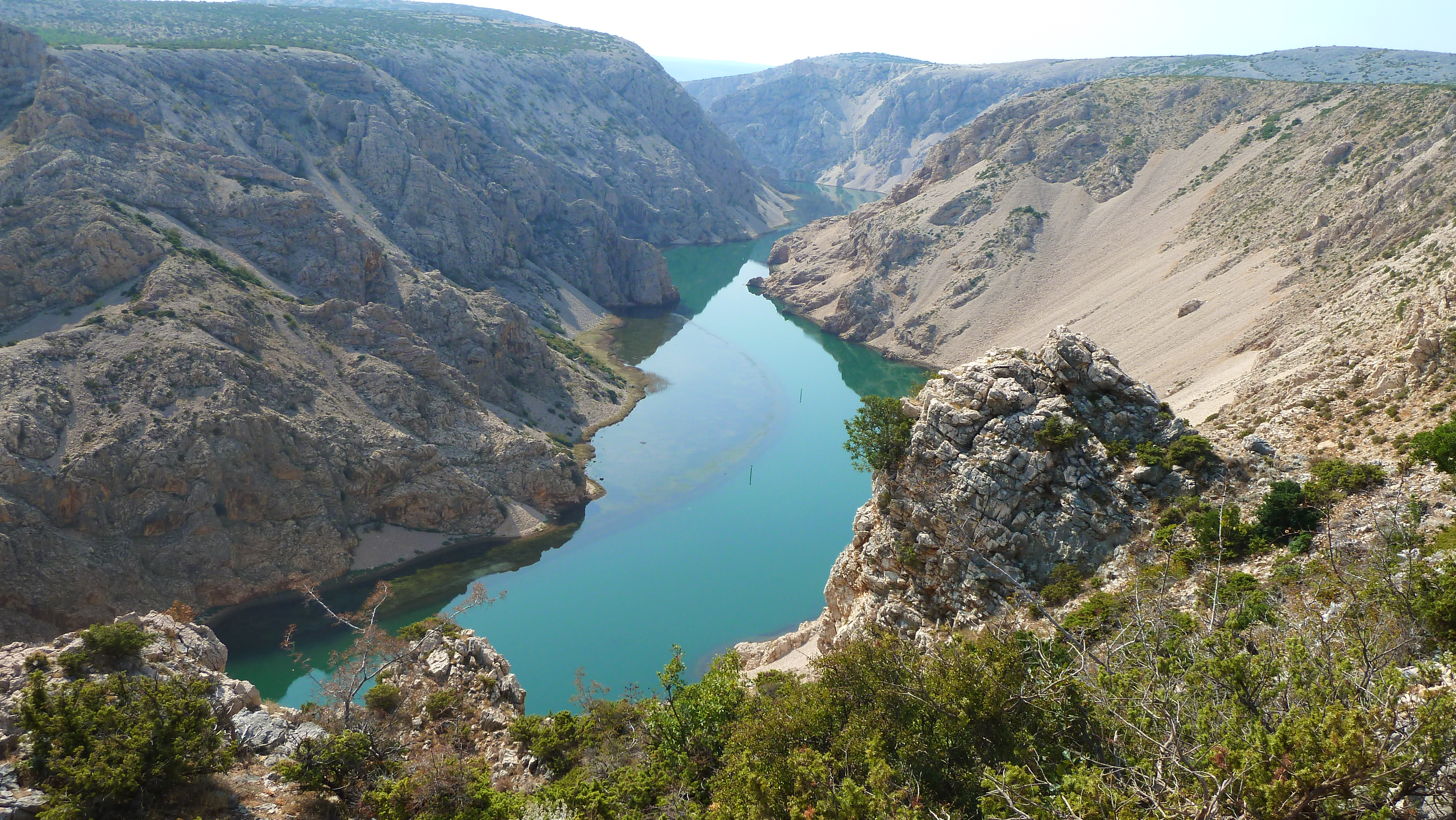 Zrmanja